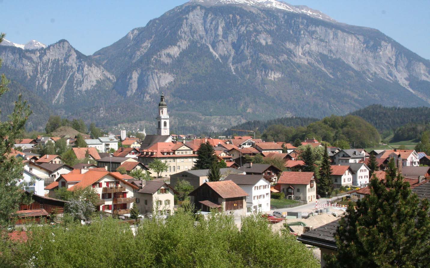 Rhäzüns